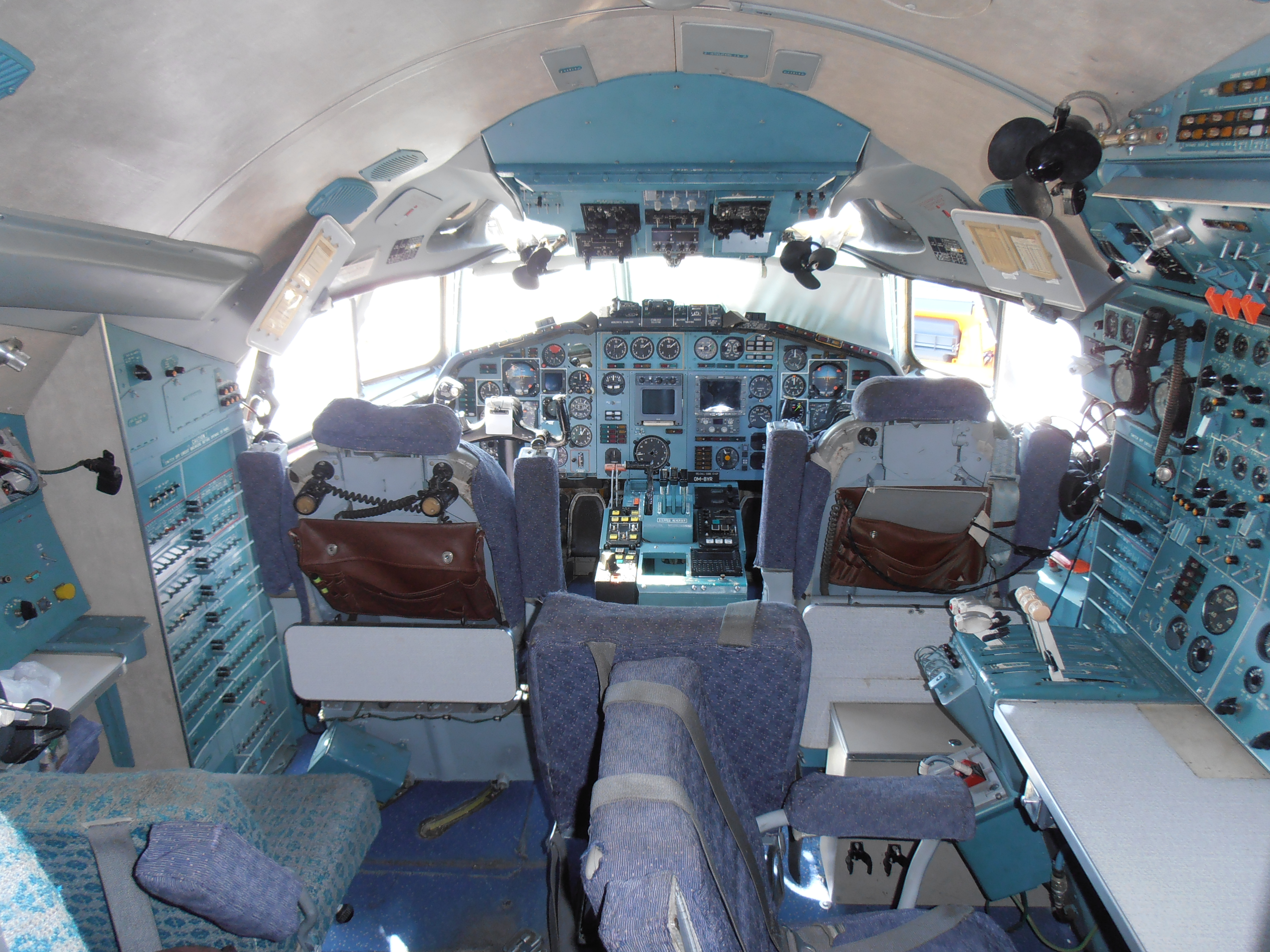 Kokpit lietadla Tu-154M (OM-BYR) letky Ministerstva vnútra SR